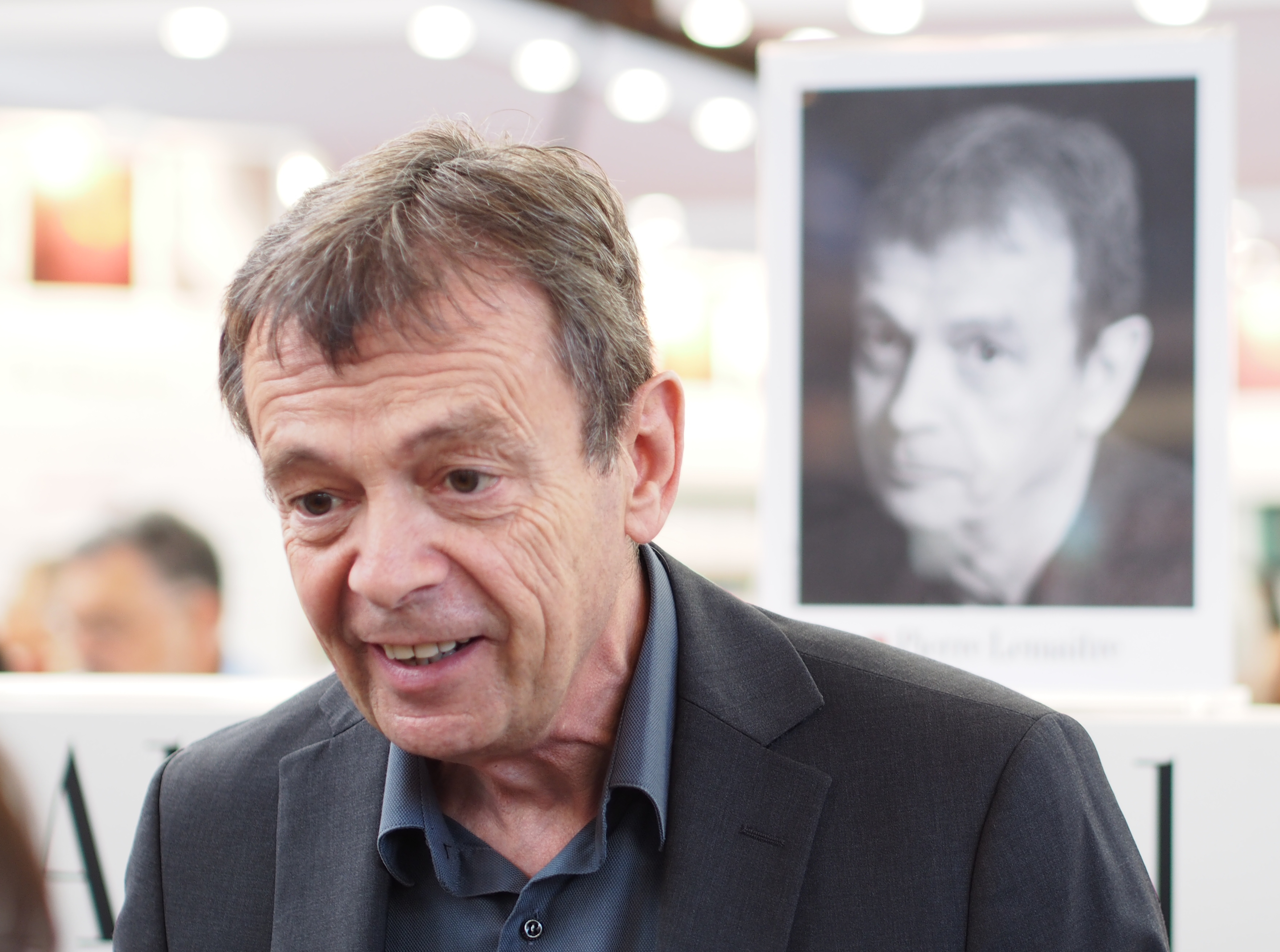 Pierre Lemaitre, lauréat du prix Goncourt 2013, au Salon du livre de Paris, le dimanche 23 mars 2014.